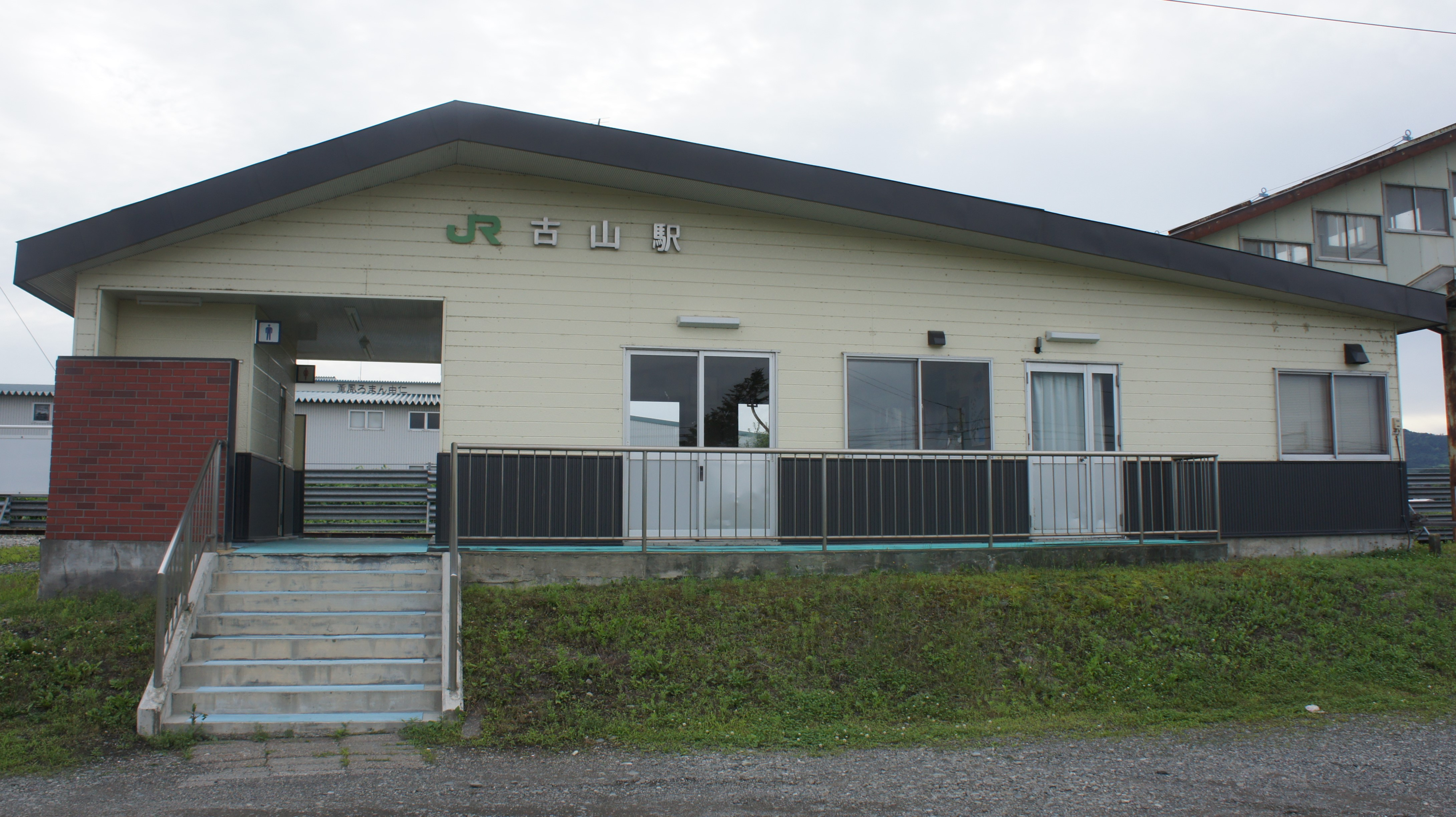 JR室蘭本線・古山駅の駅舎